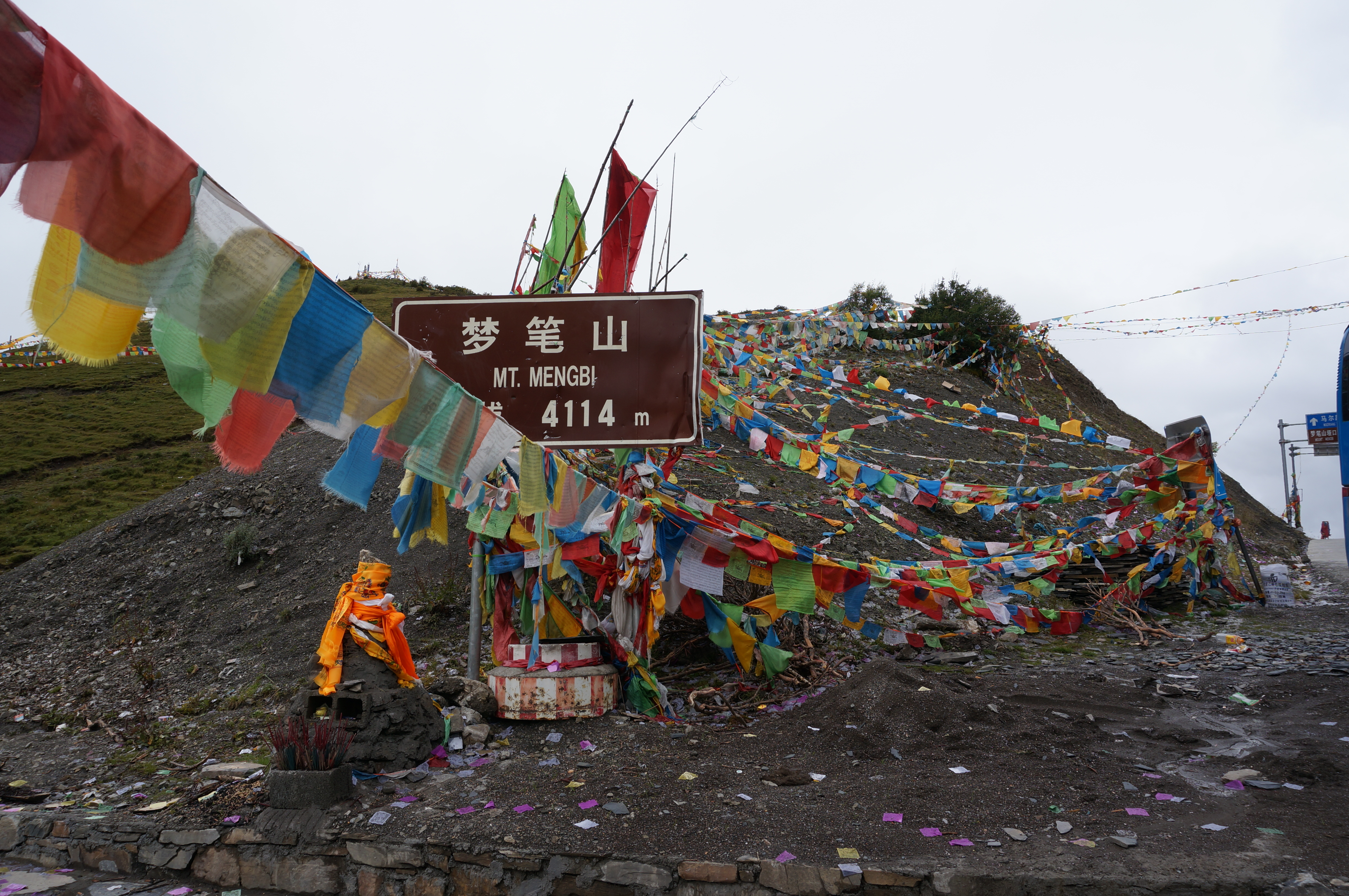 马尔康县梦笔山。